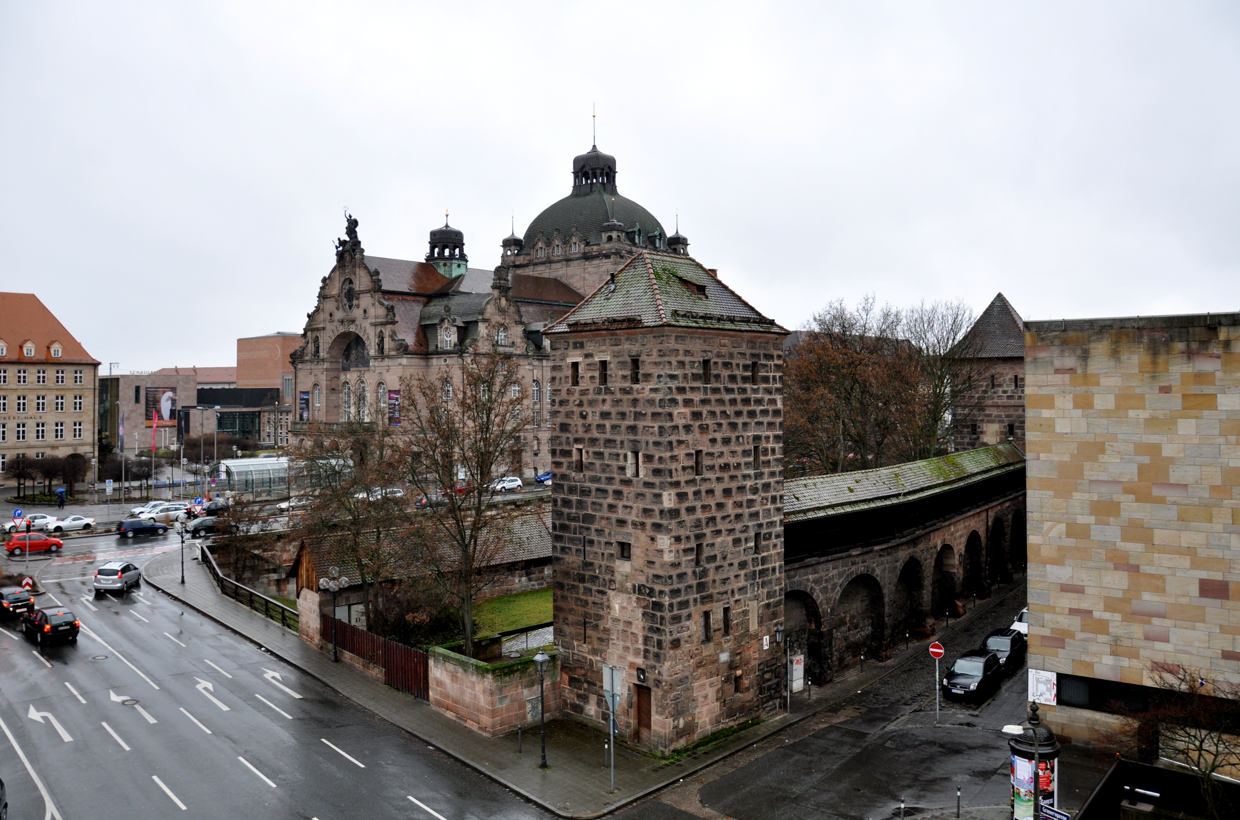 Nürnberg, Turm Rotes A am Sterntor (Durchbruch der Frauentormauer) mit Blick zum Staatstheater, rechts davon Turm Rotes B, ganz rechts eine Ecke des Germanischen Nationalmuseum an der Grasersgasee